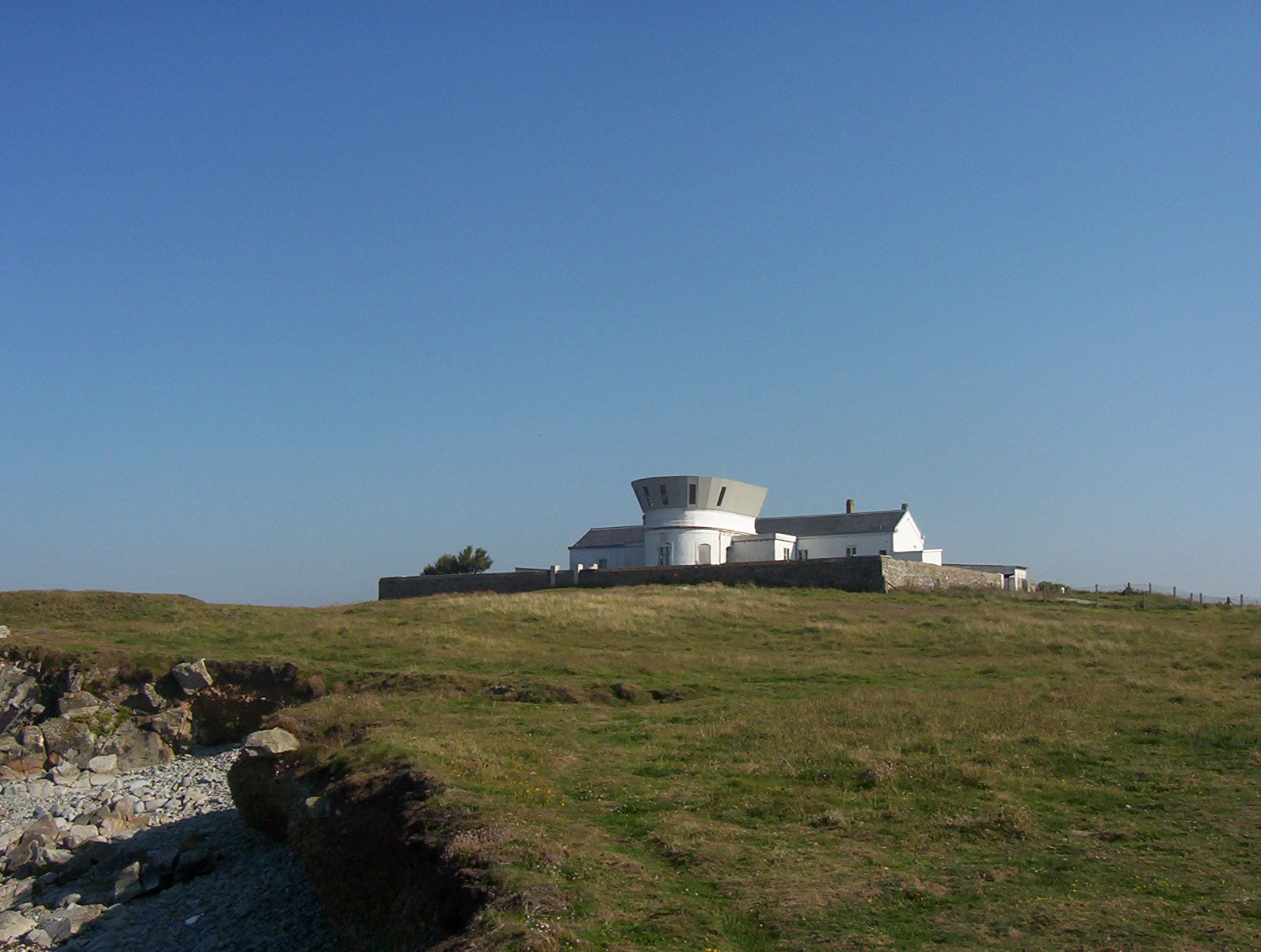 Le sémaphore de Jardeheu, Digulleville.